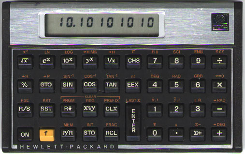 HP-10C programmable calculator